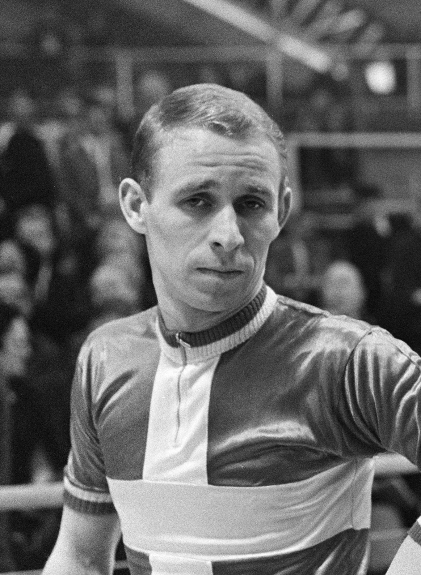 Zesdaagse in de RAI. Freddy Eugen (Denemarken).